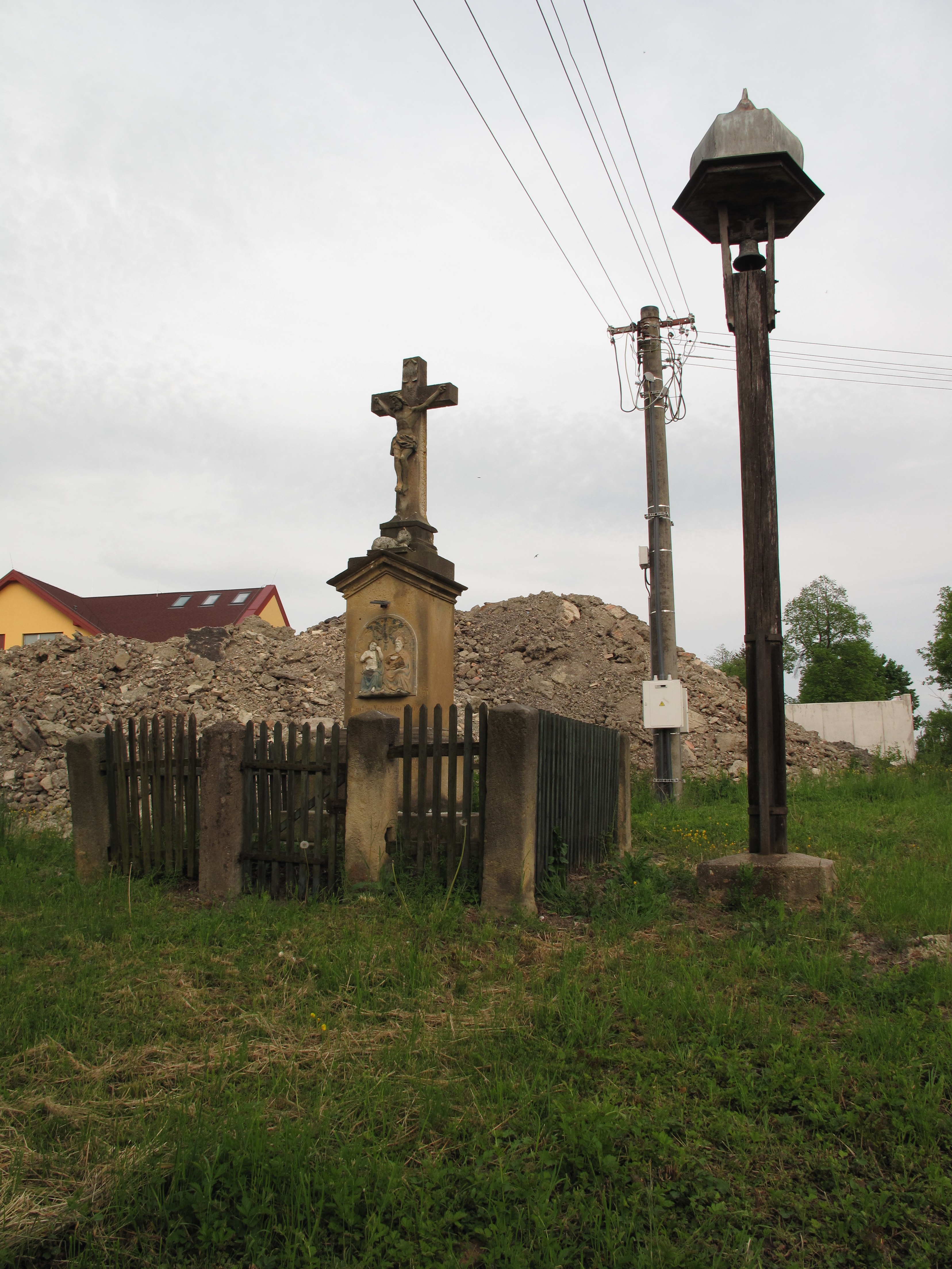 Křížek v Nových Zámcích. Okres Nymburk, Česká republika.